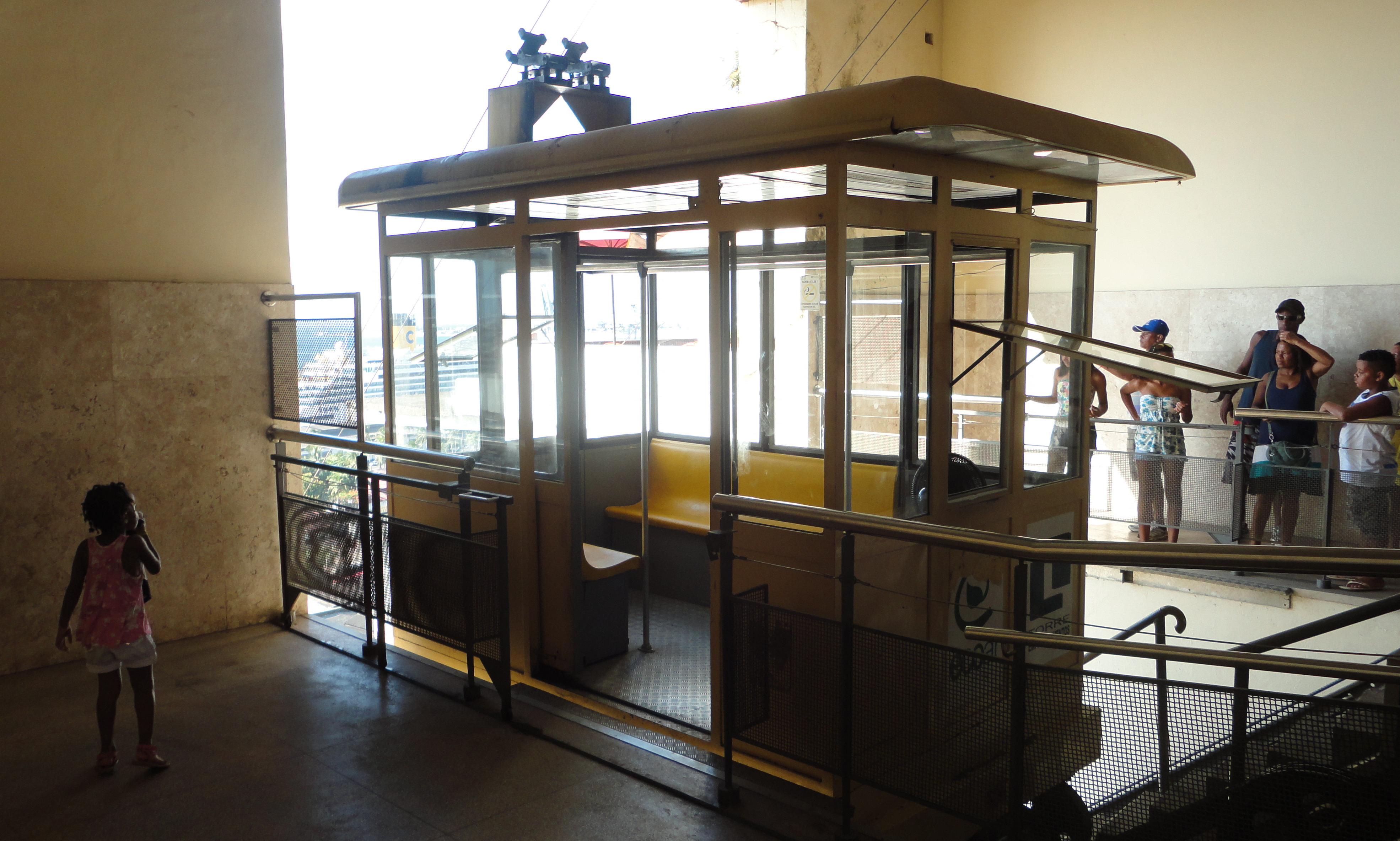 Cabine e vista da cidade baixa a partir da plataforma de embarque na Cidade Alta, Praça Ramos de Queiroz.